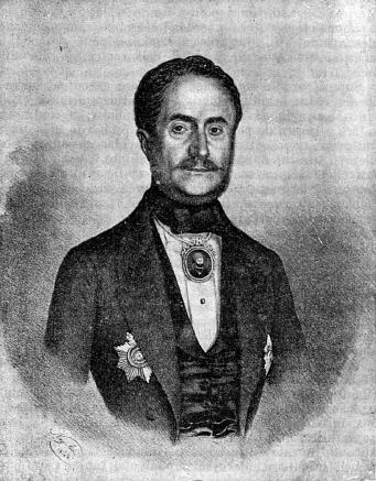 Mihail Sturdza, (n. 24 aprilie 1794, Iași - d. 8 mai 1884, Paris) a fost domnitor al Moldovei între aprilie 1834 și iunie 1849.